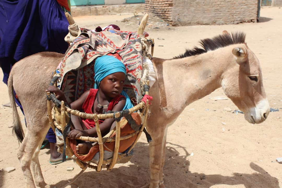 C'est un âne transportant un enfant sur une route de Bol dans la province du Lac This is an image with the theme "Africa on the Move or Transport" from: Chad